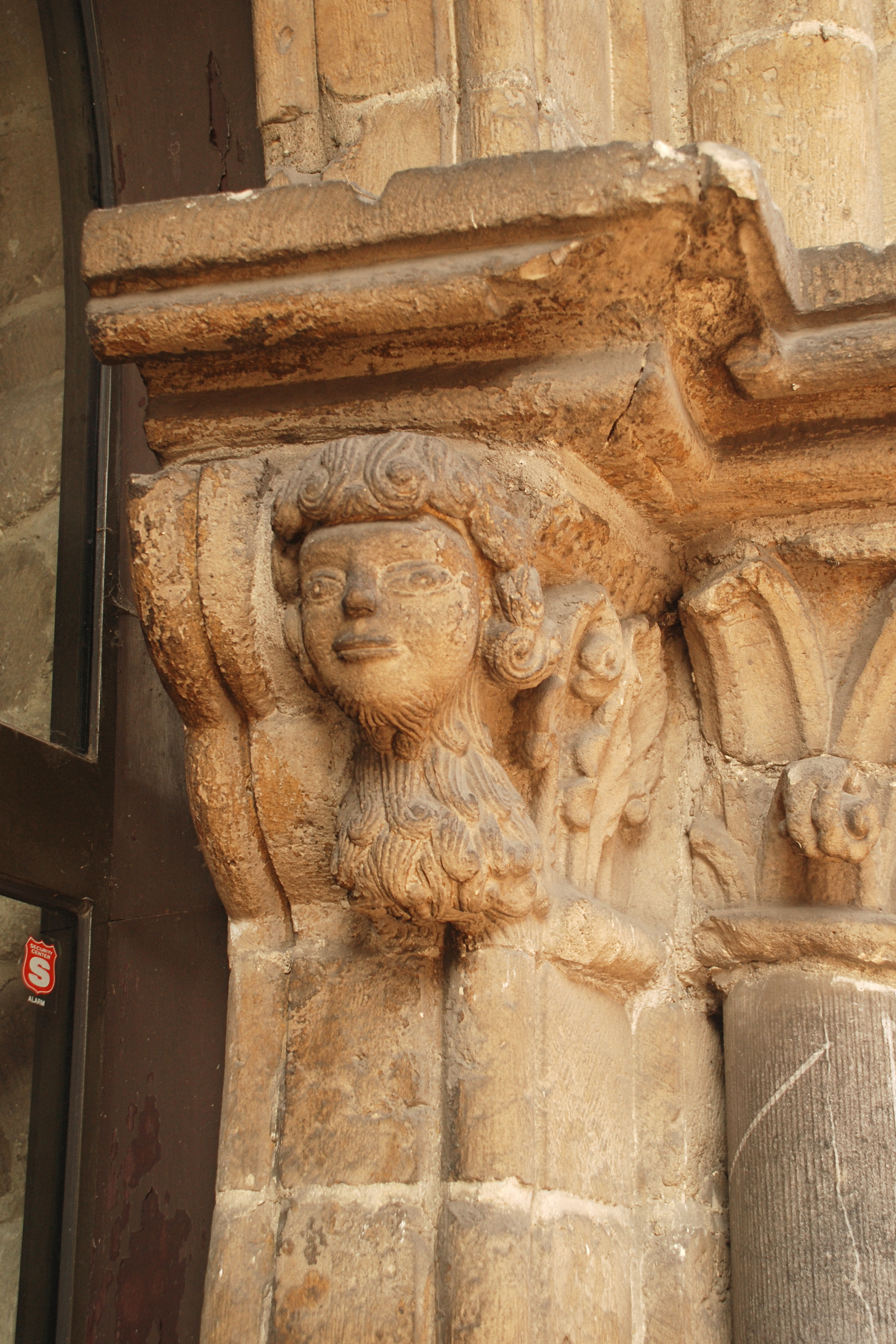 Belgique - Louvain - Chapelle de la Porte Romane